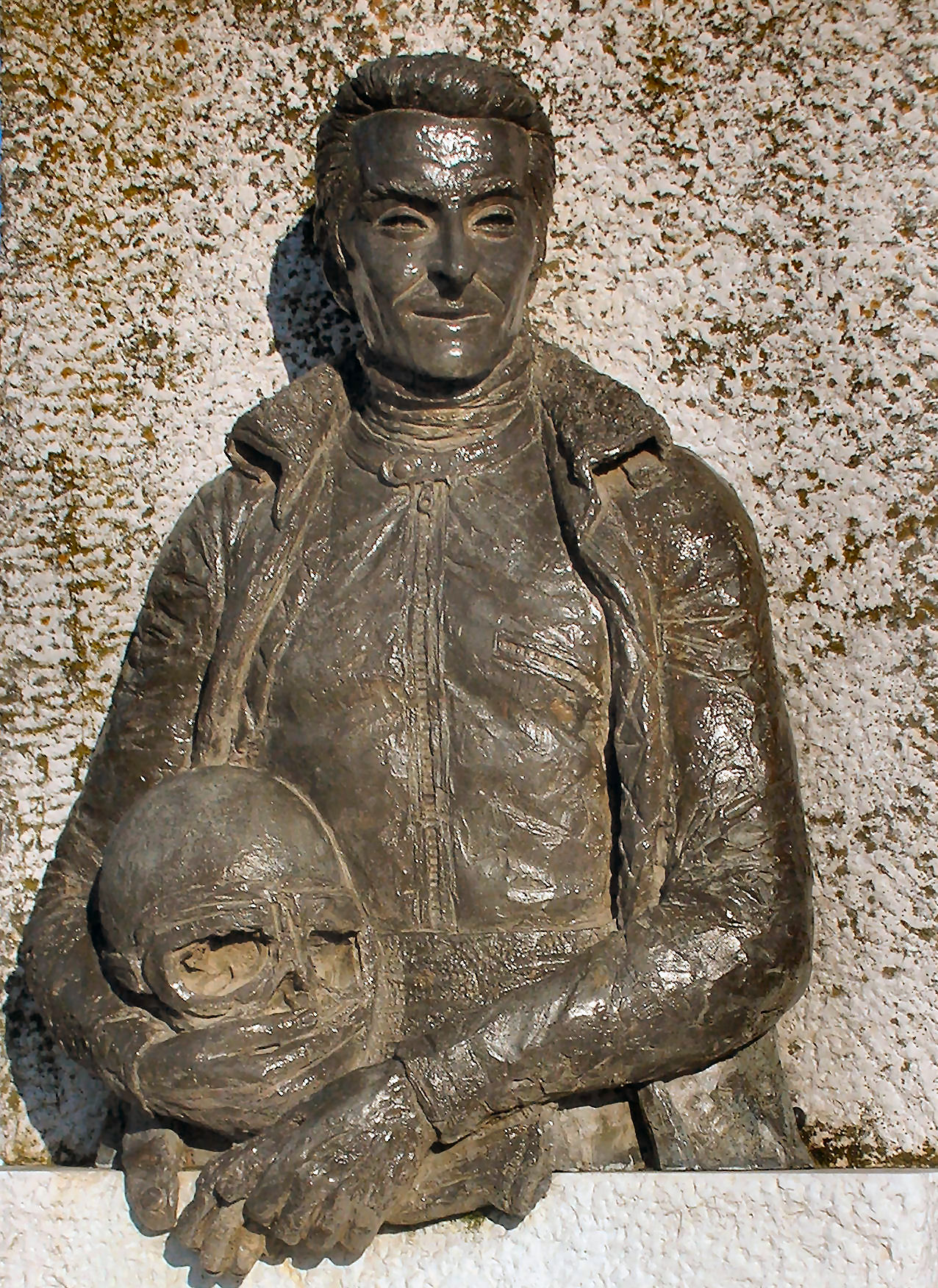 Monumento angelo bergamonti